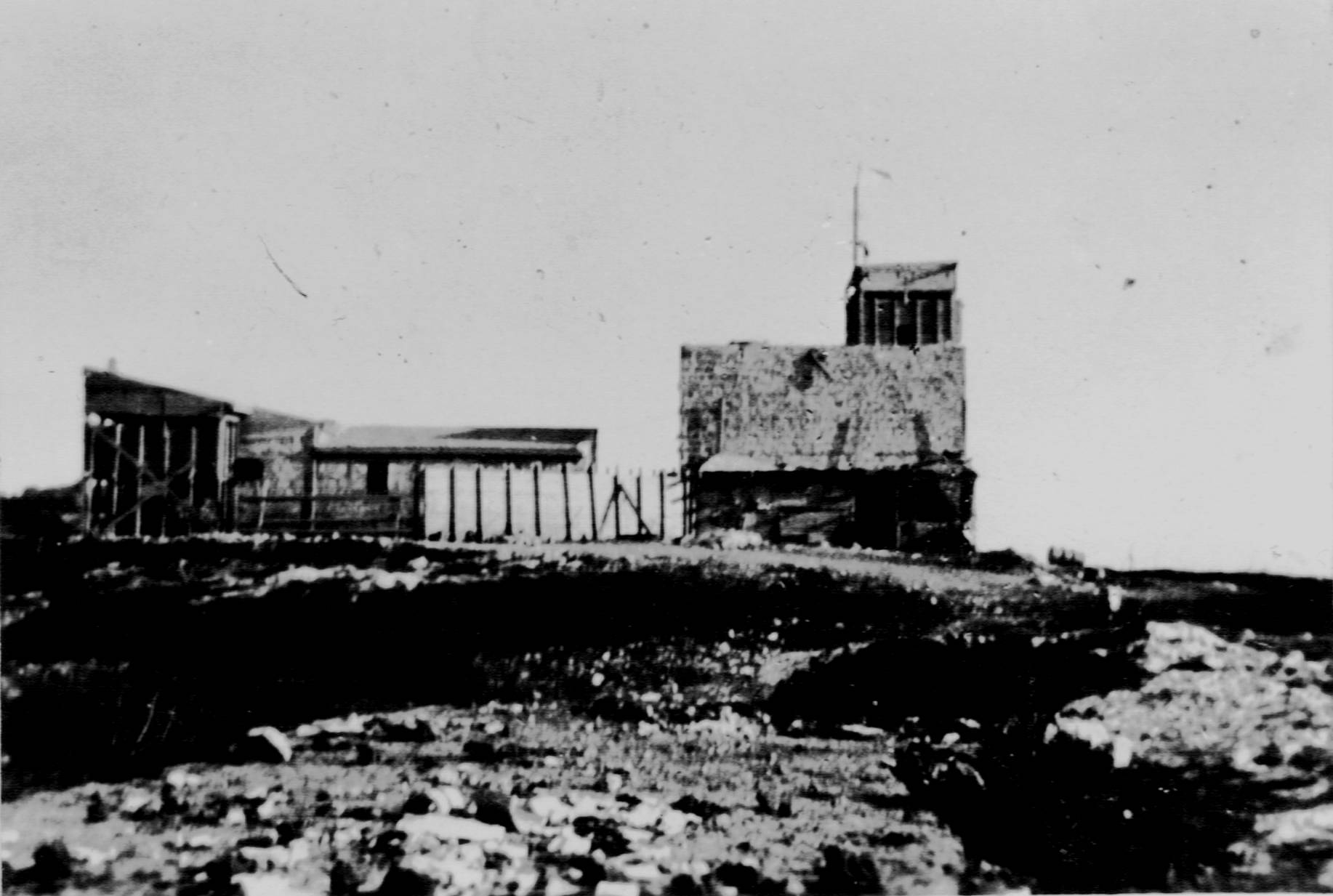 Mishmar Hacarmel was a temporary settlement point. It was established in 1939 in the east of today's Haifa University. משמר הכרמל היתה נקודת התיישבות זמנית שהוקמה בשנת 1939 באזור ממזרח לאוניברסיטת חיפה של היום שהיה מיועד לבניית שכונת מגורים. נקודת ההתיישבות הוקמה במטרה לשמור את האזור מפני ניסיונות לנצלו למטרות עיבוד על ידי תושבי האזור. המבנה המרכזי בהתיישבות משמר הכרמל. צולם בין השנים 1942-1947. לאחר שהמקום נעזב המבנה נהרס אט אט. הצילום הוא של פטר בלוג ממתיישבי המקום שעזב אותו בשנת 1947 ועבר לגור בקרית עמל. הצילום התקבל מבנו מישי בלוג